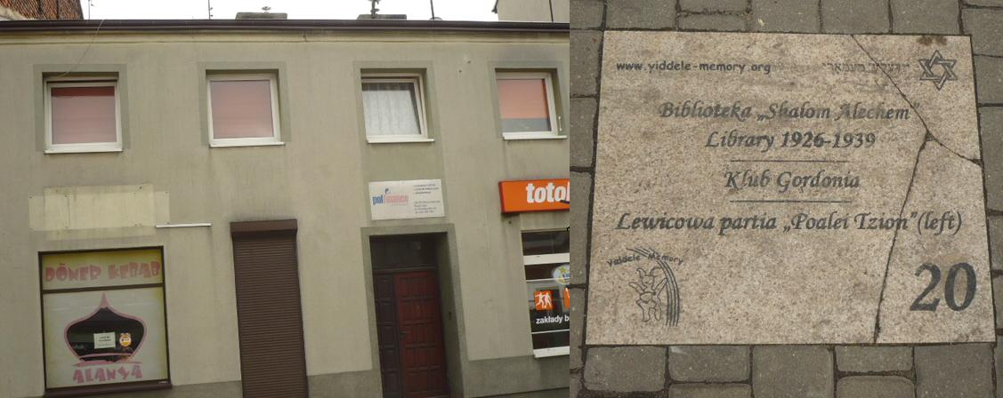 Radomsko. Otwarte Muzeum Żydowskie 20